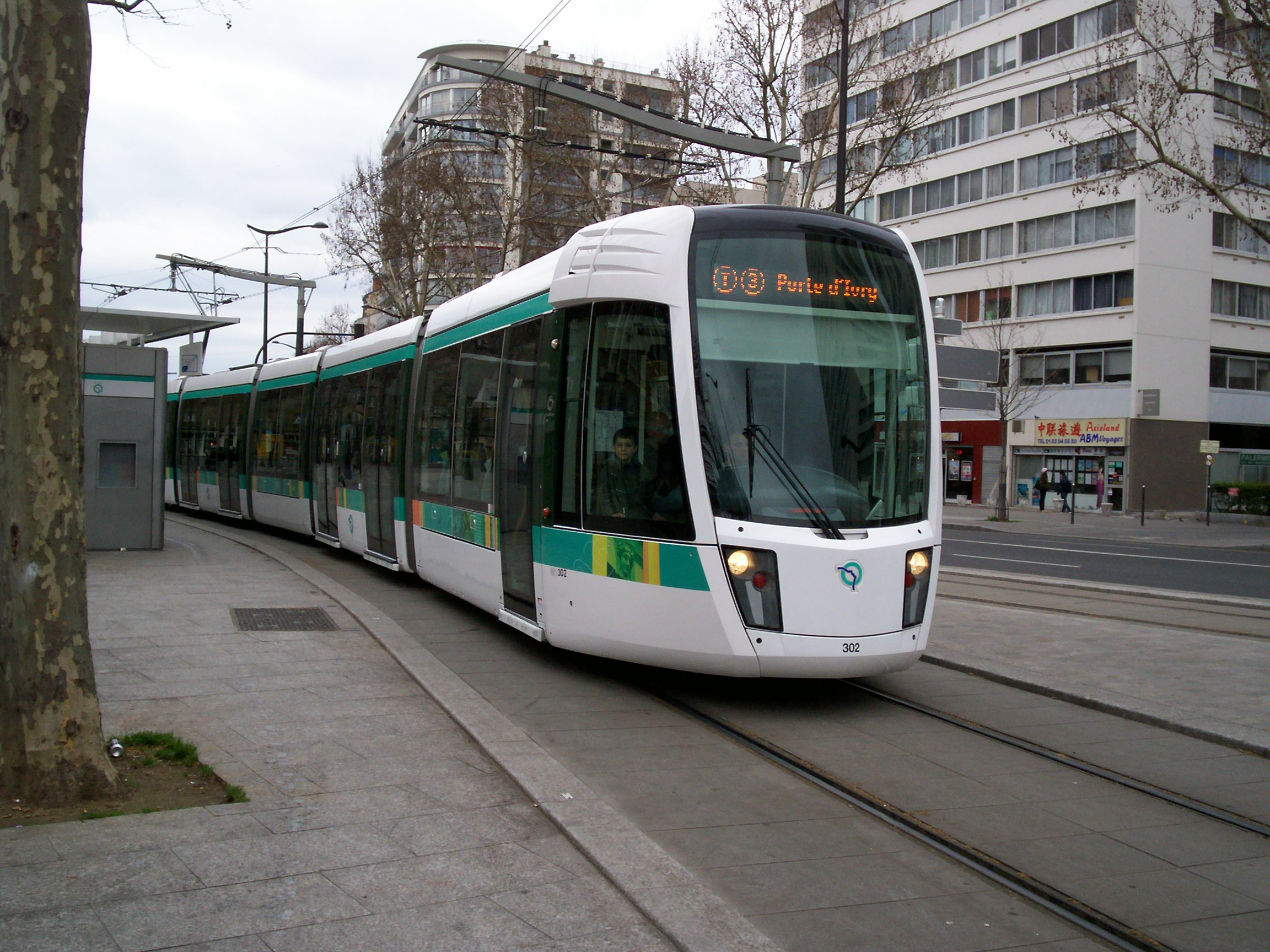 Rame Citadis à Porte de Choisy, vers Porte d'Ivry